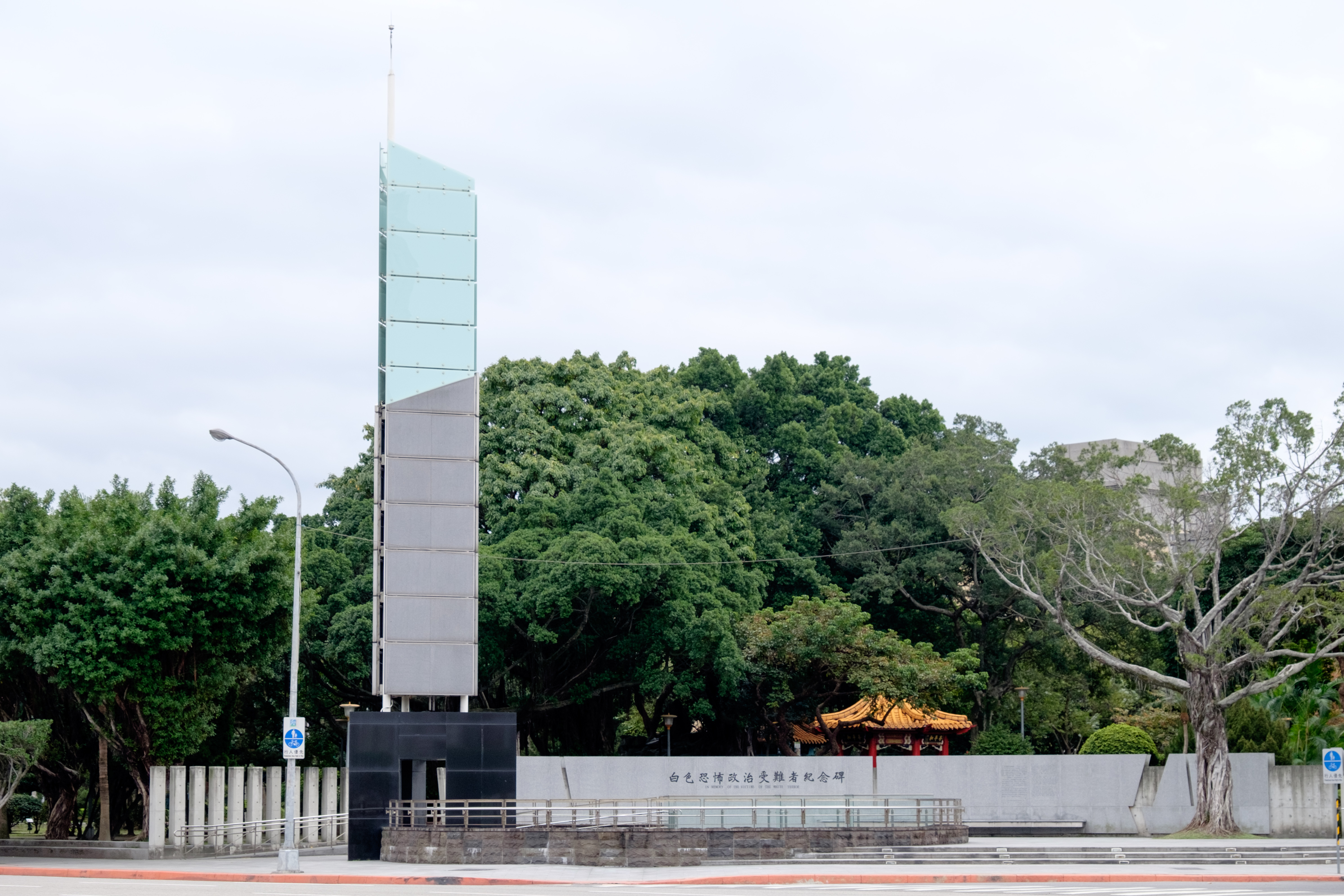 從凱達格蘭大道（原介壽路）與懷寧街口東南遠望白色恐怖政治受難者紀念碑正面。